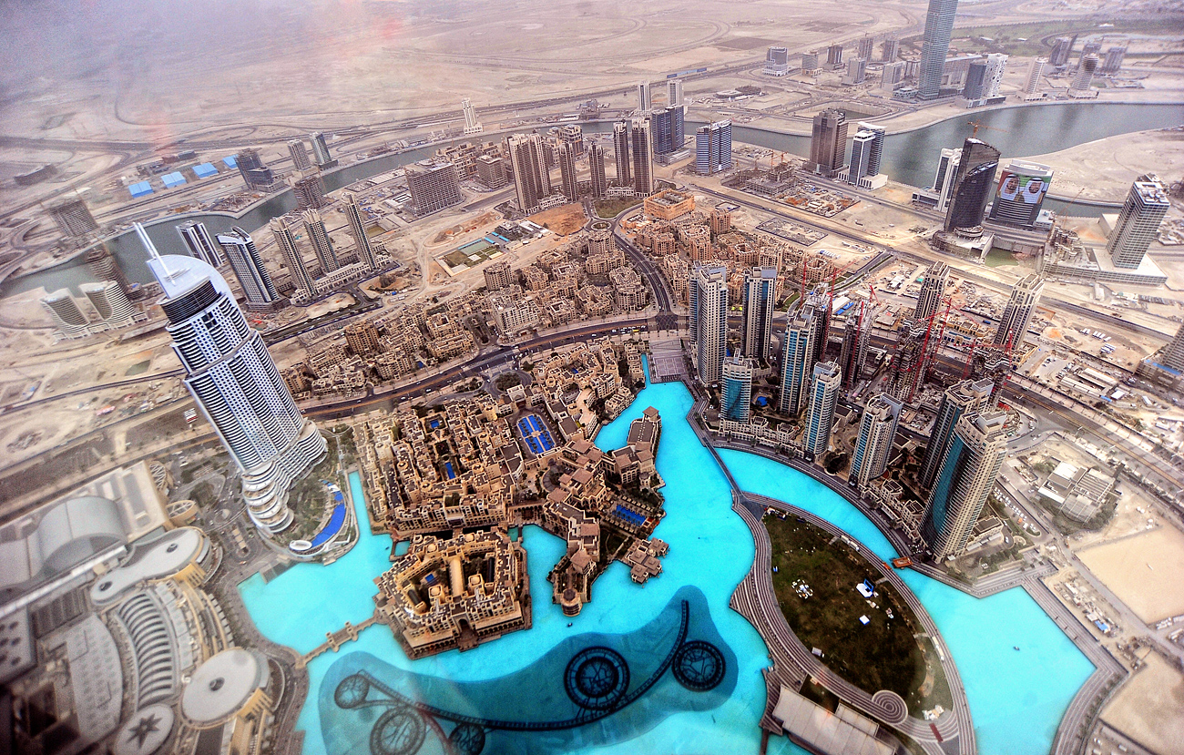 DUBAI 2012 BLICK VOM BURJ KHALIFA - VIEW FROM BURJ KHALIFA - 828 Meter